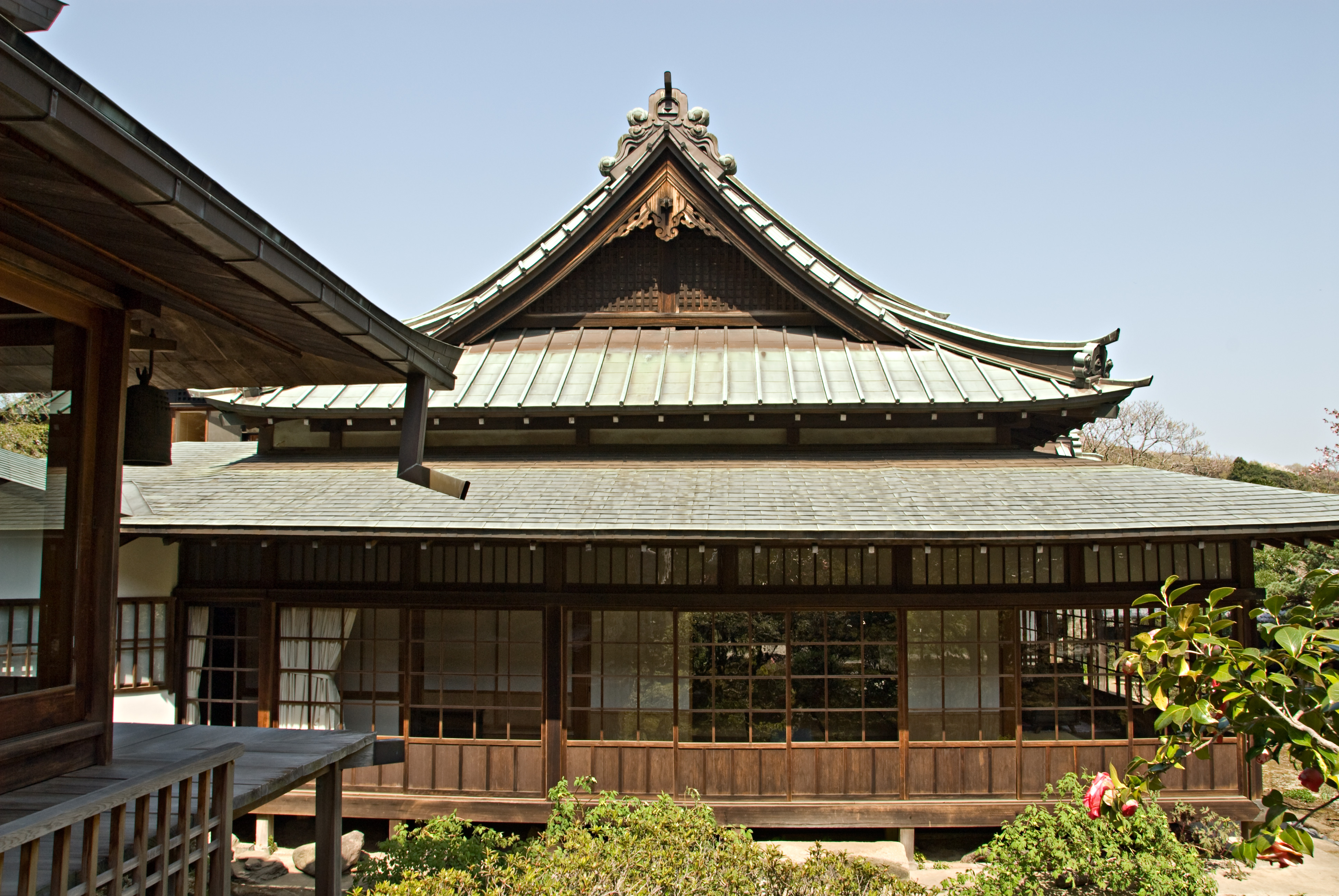 Tokei-ji Temple, Kita-Kamakura